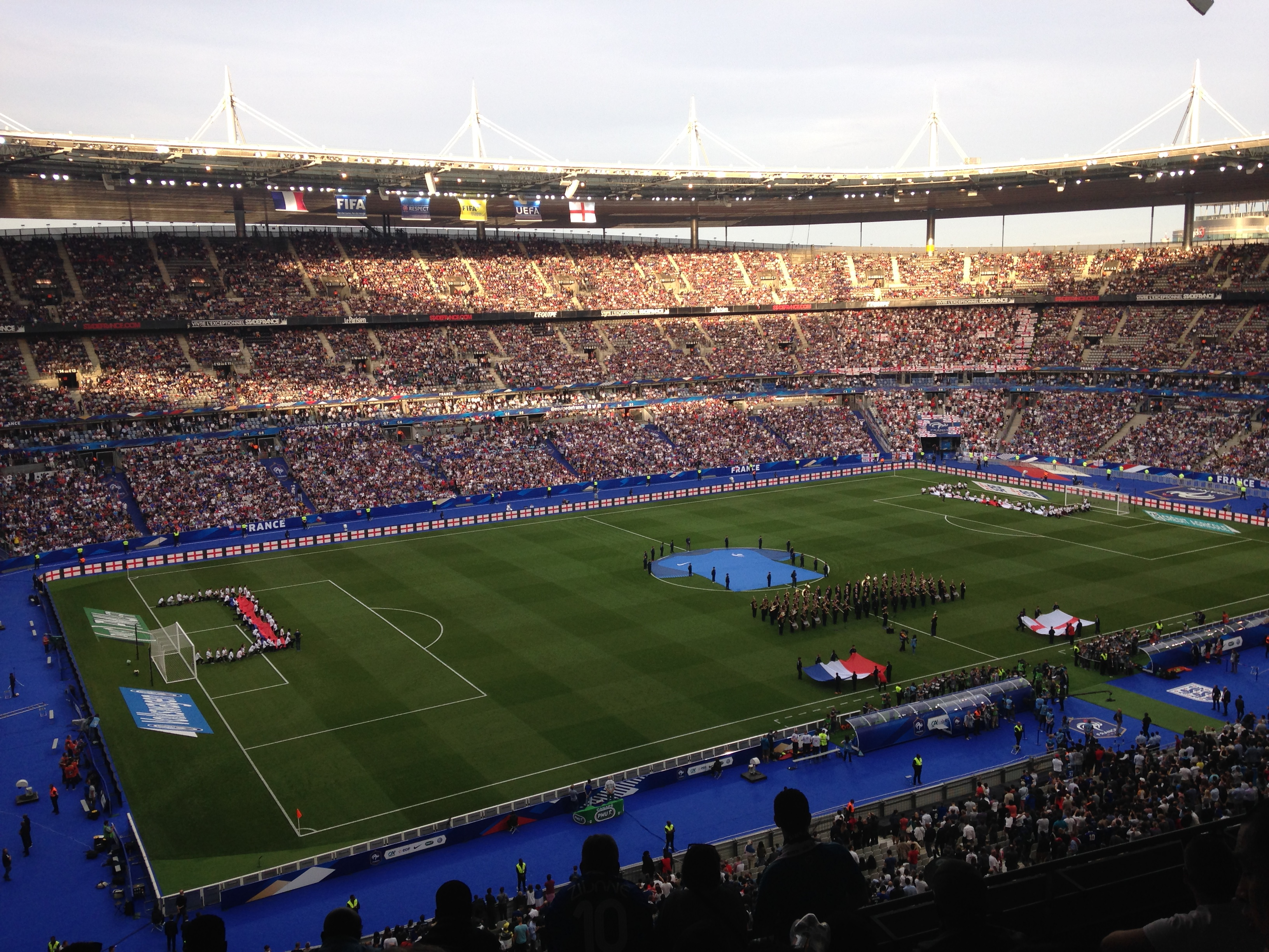 stade de france